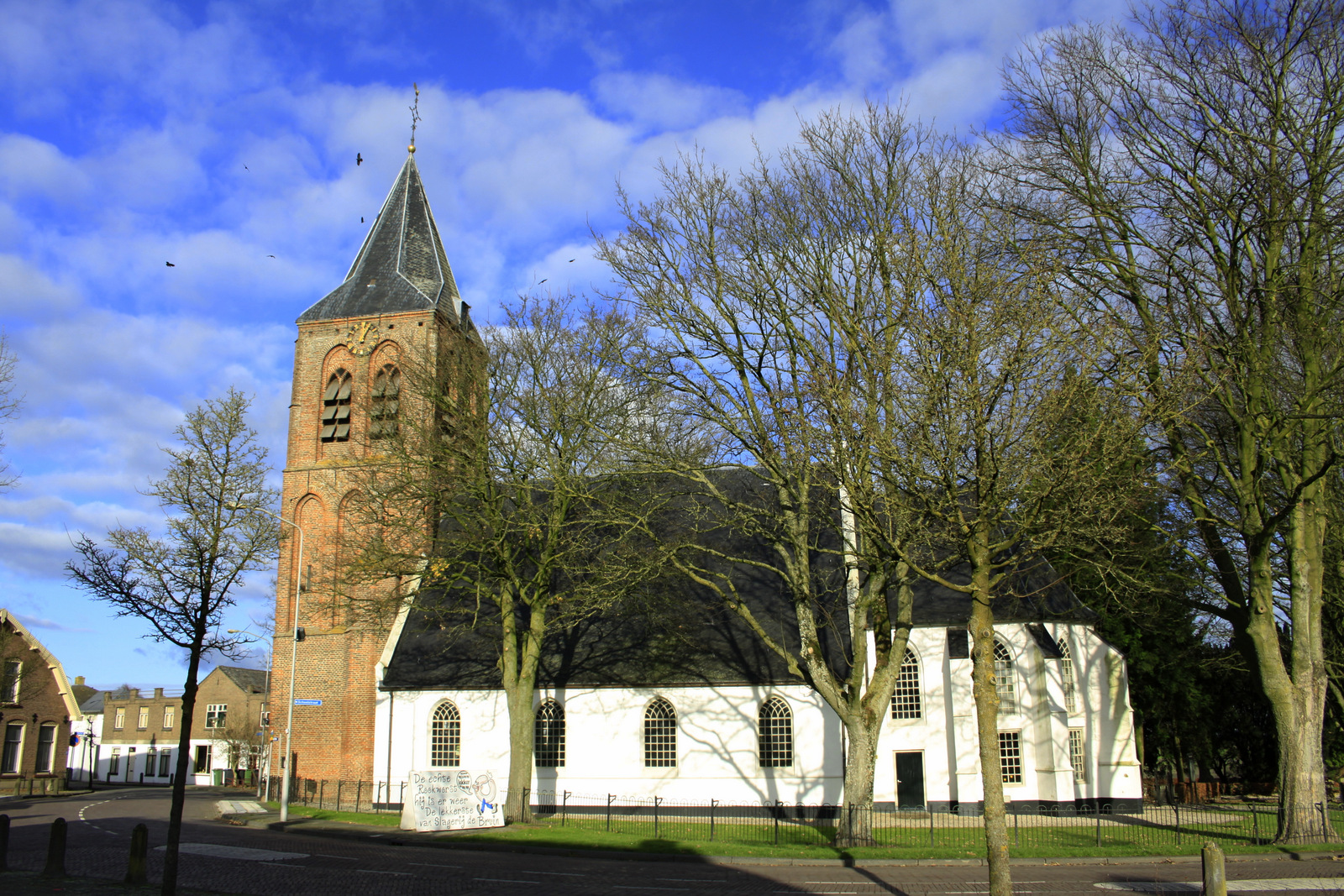 Zoelmond even ten Zuid Westen van Beusichem.